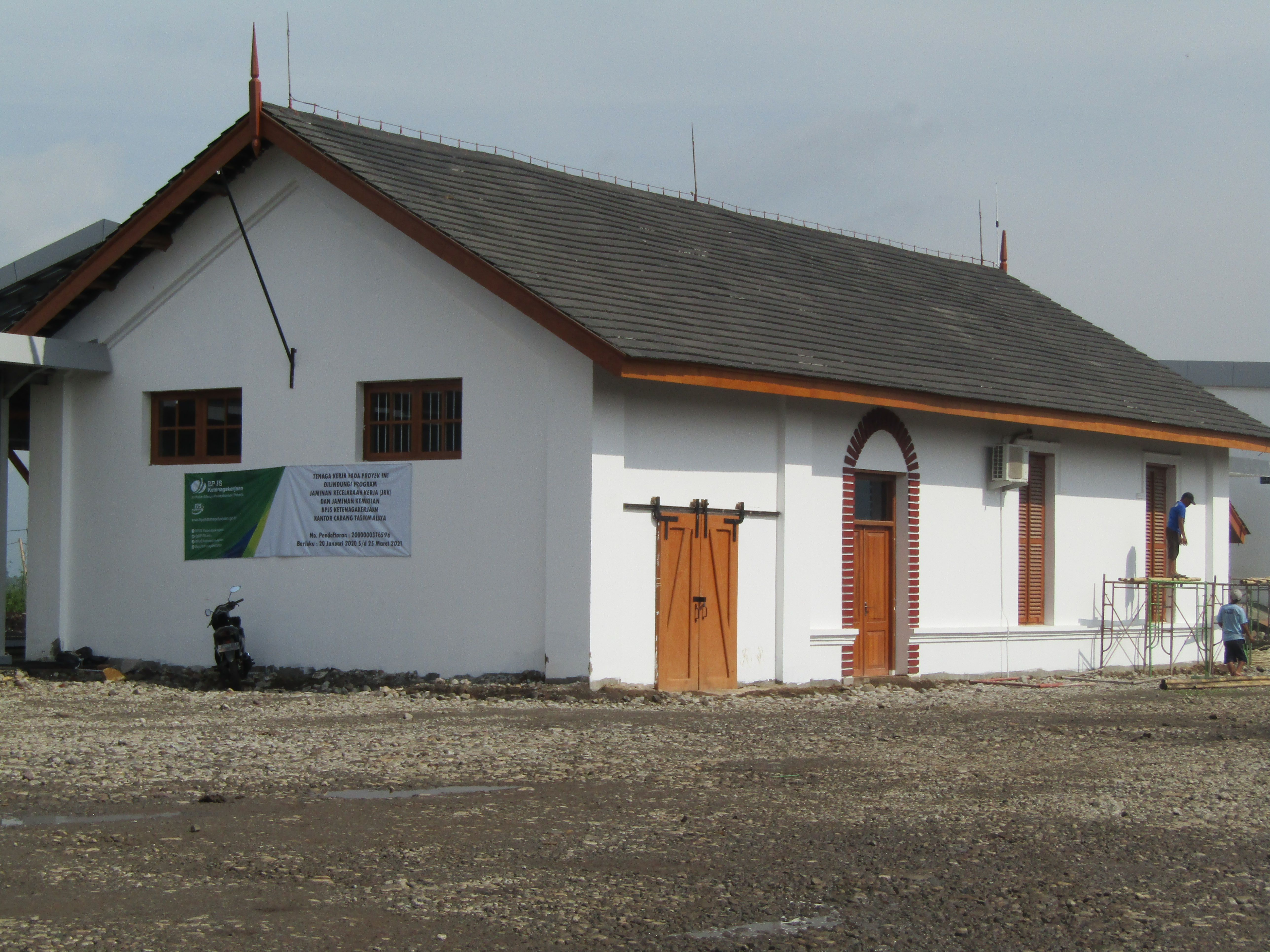 Stasiun Wanaraja, 2020